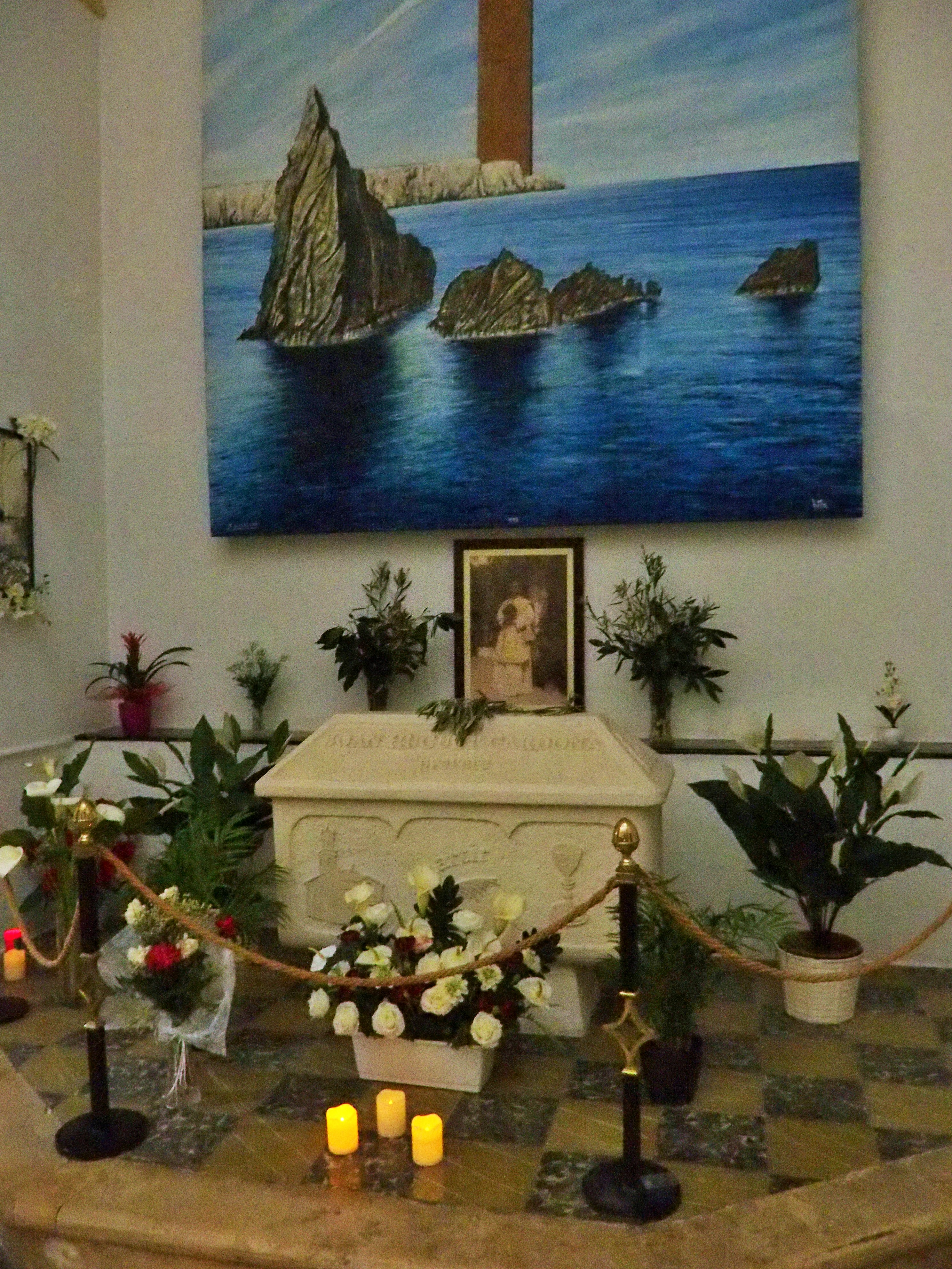 Tomba del beat màrtir Joan Huguet Cardona en l'església de Sant Bartomeu de Ferreries (Menorca)